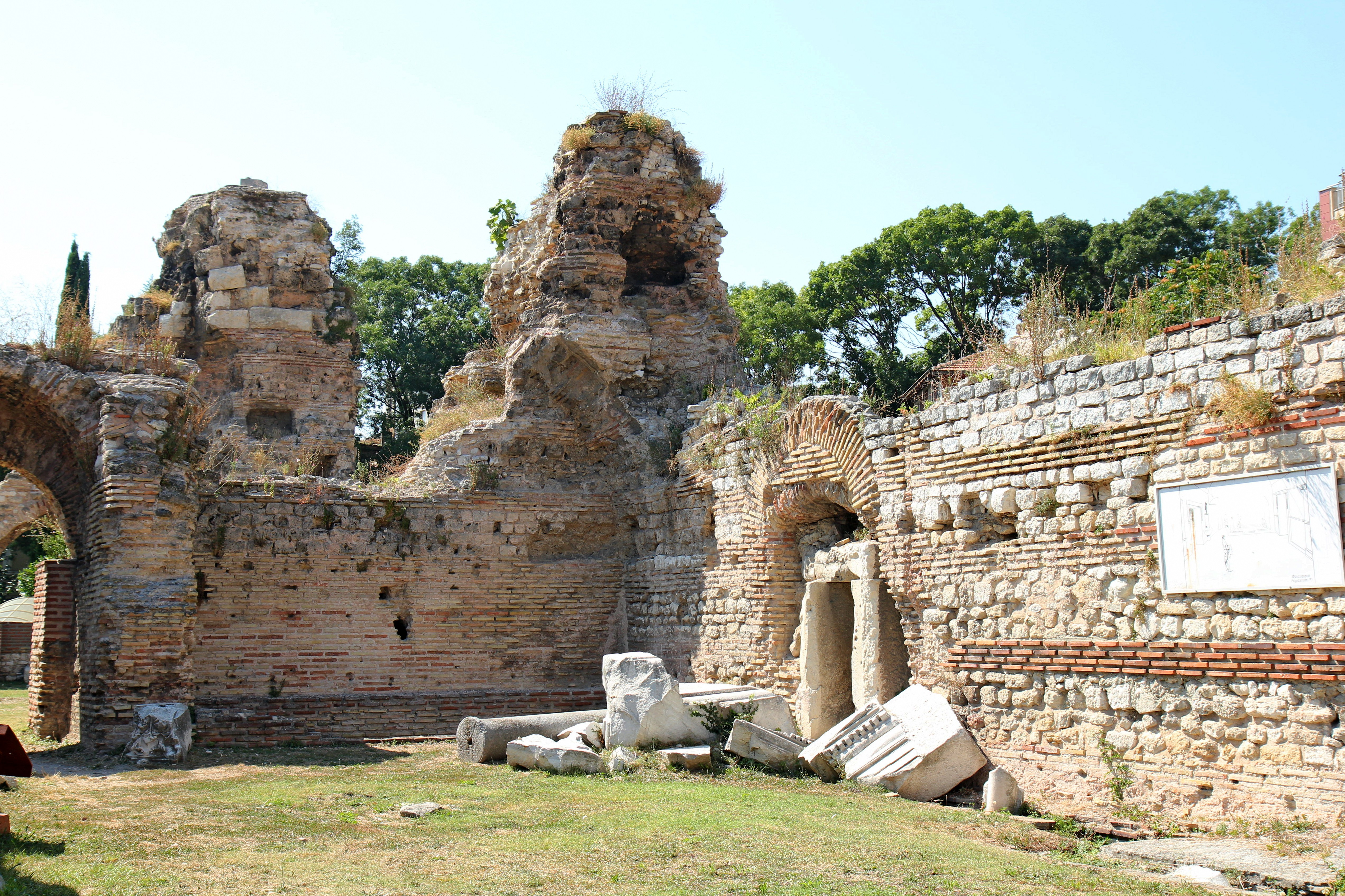 Антична сграда Римски терми